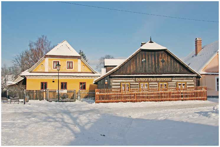 Hlinecký Betlém v zimě.